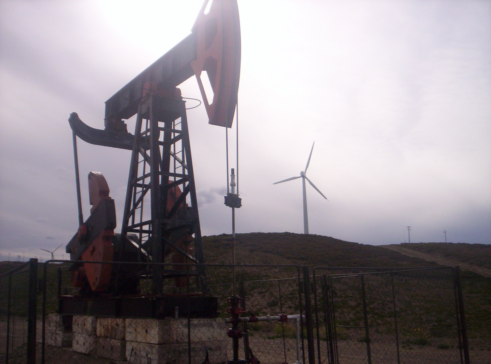 Balancín y molino eólico, los máximos exponentes de generación de energía, en Comodoro Rivadavia